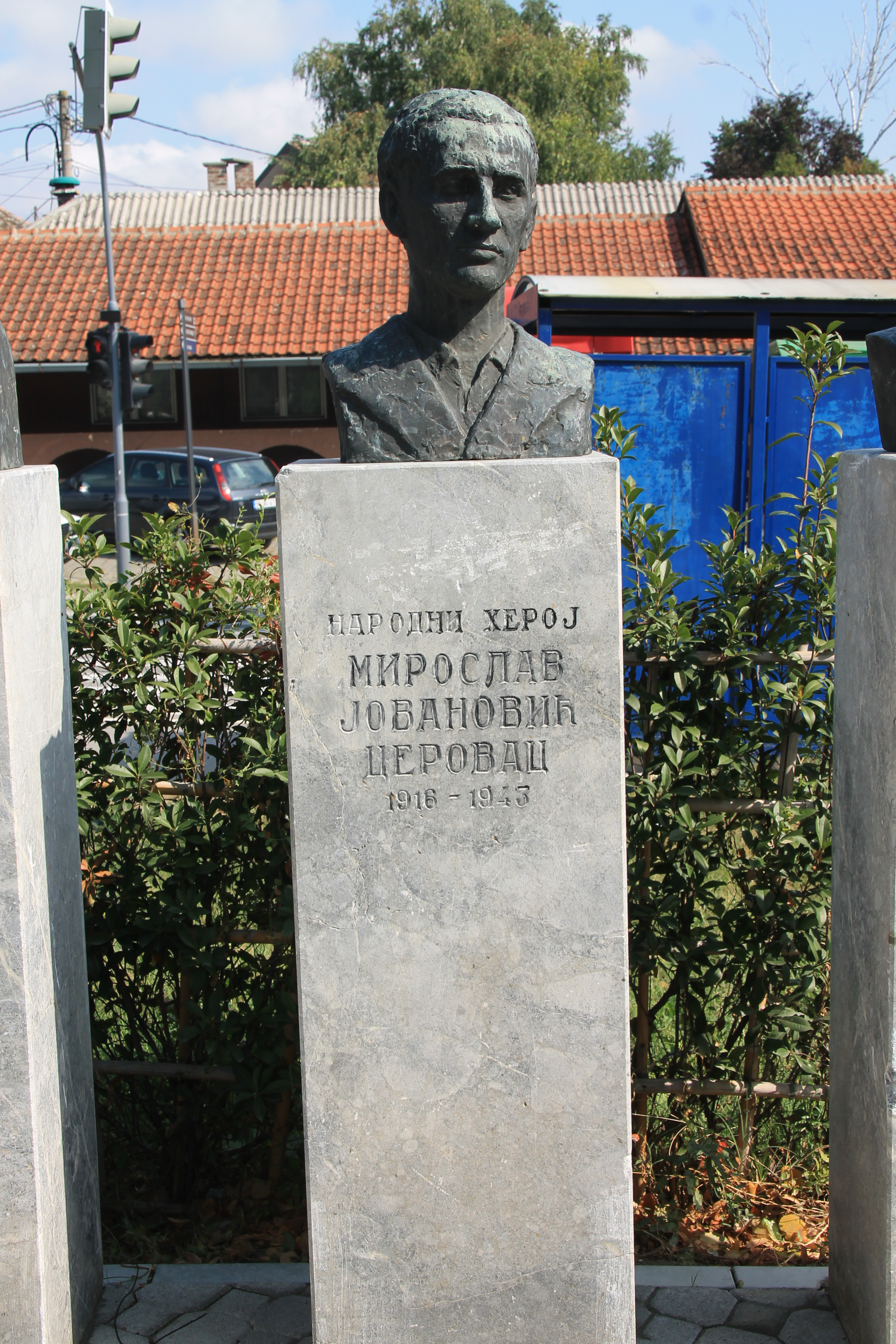 Monuments in Grocka